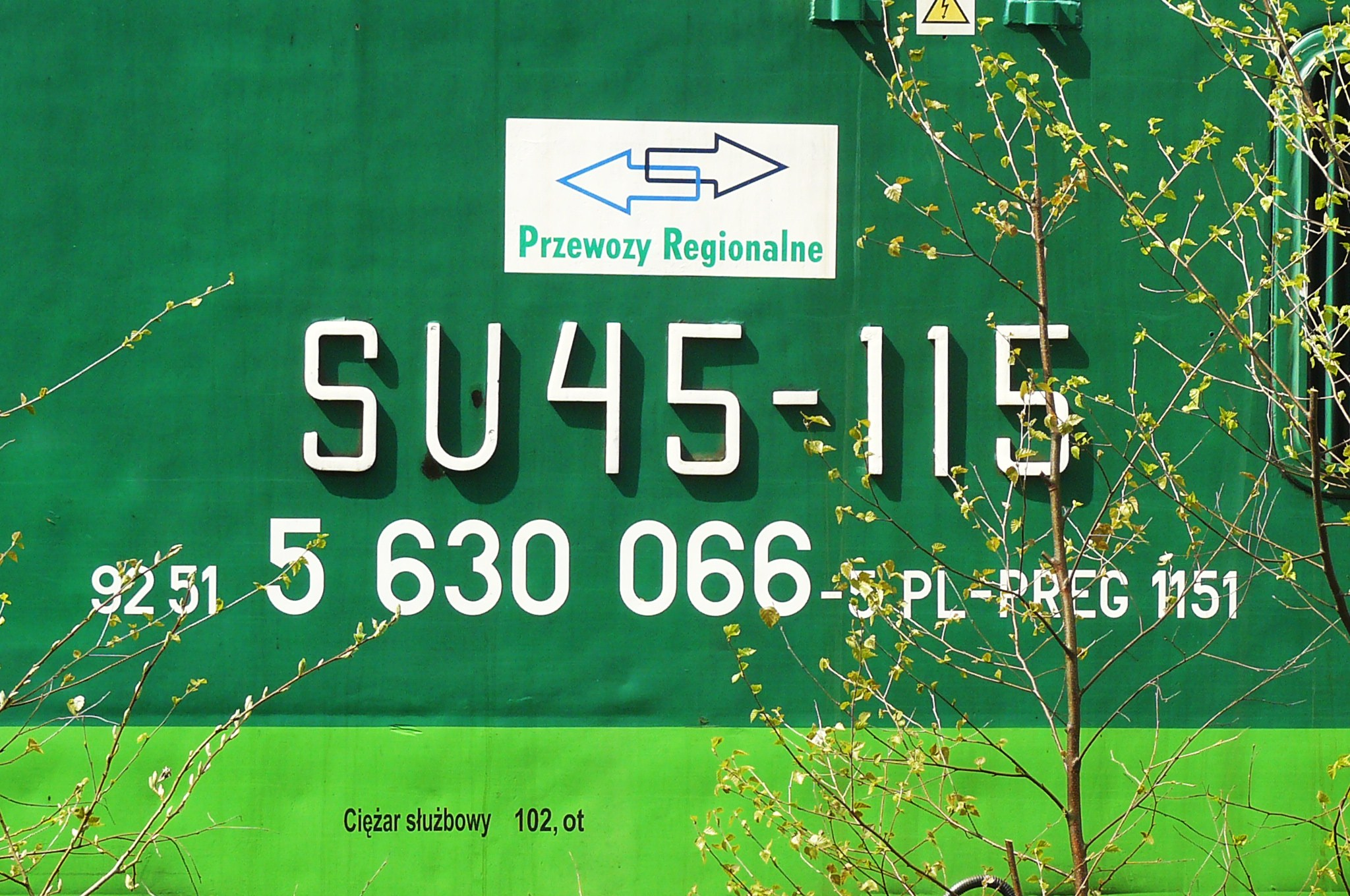 SU45-115 z pociągiem specjalnym "Dolnośląskie Zakamarki" (25.4.2015r.).